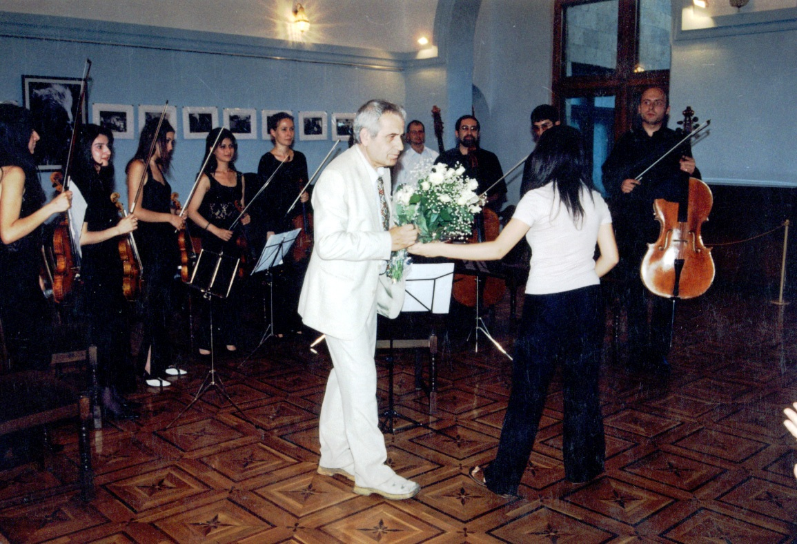 После концерта в доме-музее А. Хачатуряна, Ереван, 2007